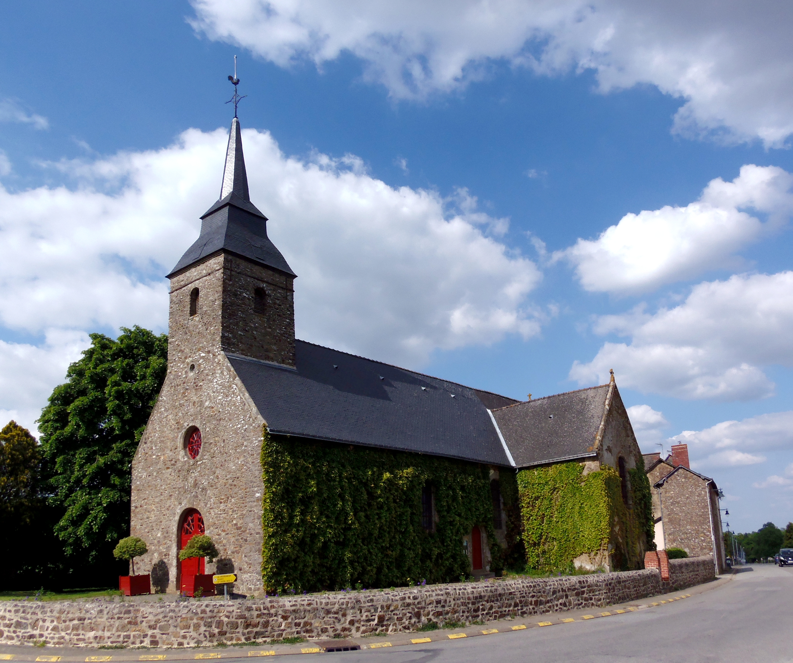 Launay-Villiers (Pays de la Loire, France). L'église de la Sainte-Trinité.